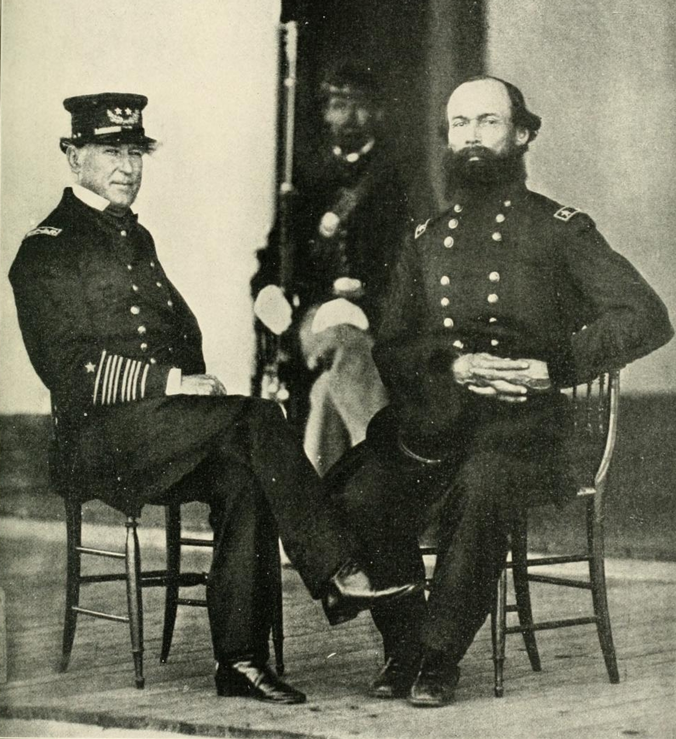 Admiral David Farragut & General Gordon Granger